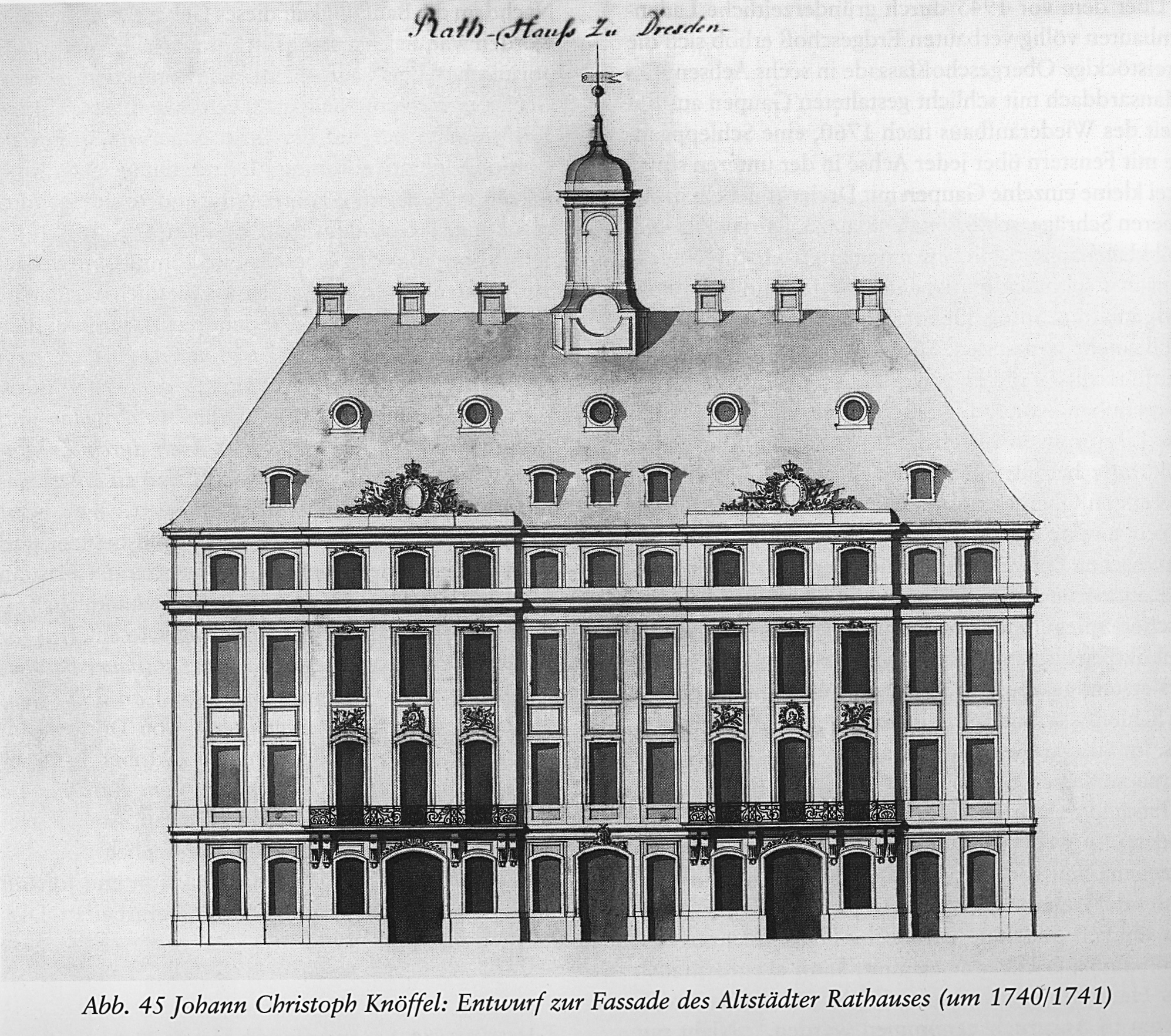 Johann Christoph Knöffel, Entwurf zur Fassade des Altstädter Rathauses in Dresden